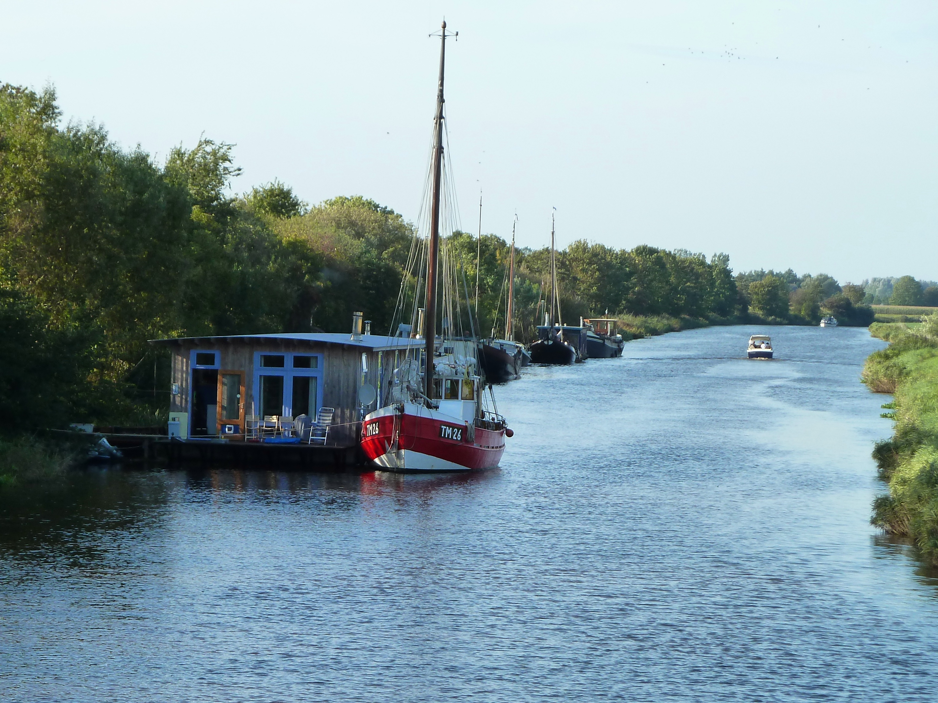 Woonboten gezien vanaf de Torensmabrug bij het gehucht Schifpot in de gemeente Winsum van de Nederlandse provincie Groningen.